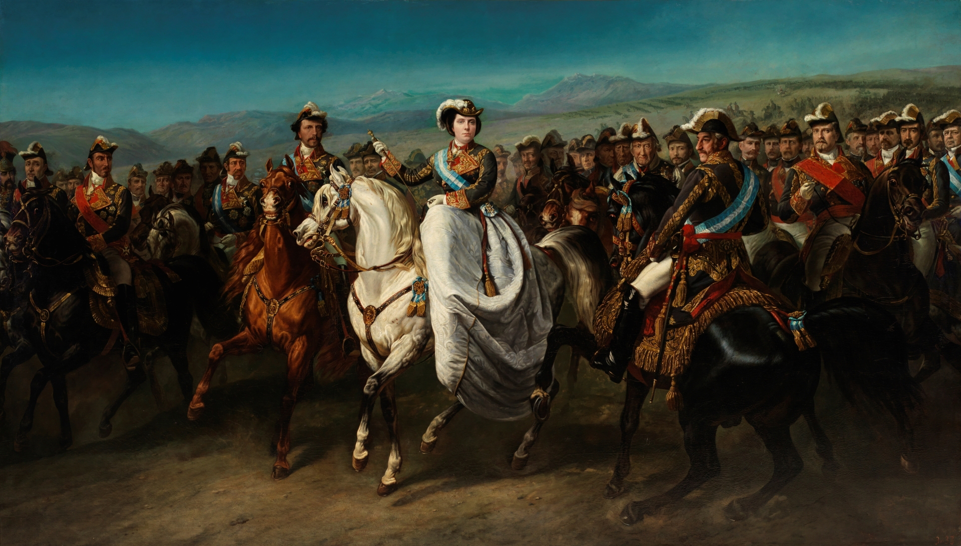 Este retrato de grupo de gran formato es una representación ideal del Estado Mayor General del Ejército español. En el centro de la composición la reina Isabel II de España, ataviada con el uniforme de capitán general, encabeza la cabalgata acompañada de su esposo Francisco de Asís de Borbón y Borbón Dos Sicilias, igualmente uniformado de capitán general, y por Francisco de Paula, infante de España. Acompañando a la joven reina Porion retrata algunos de los militares que intervinieron en los finales del gobierno de Isabel II: Narváez, O´Donell y Prim que aparecen destacados junto a otros generales que ya habían fallecido en el momento en que se realiza la obra como es el caso de Diego de León y Palafox.